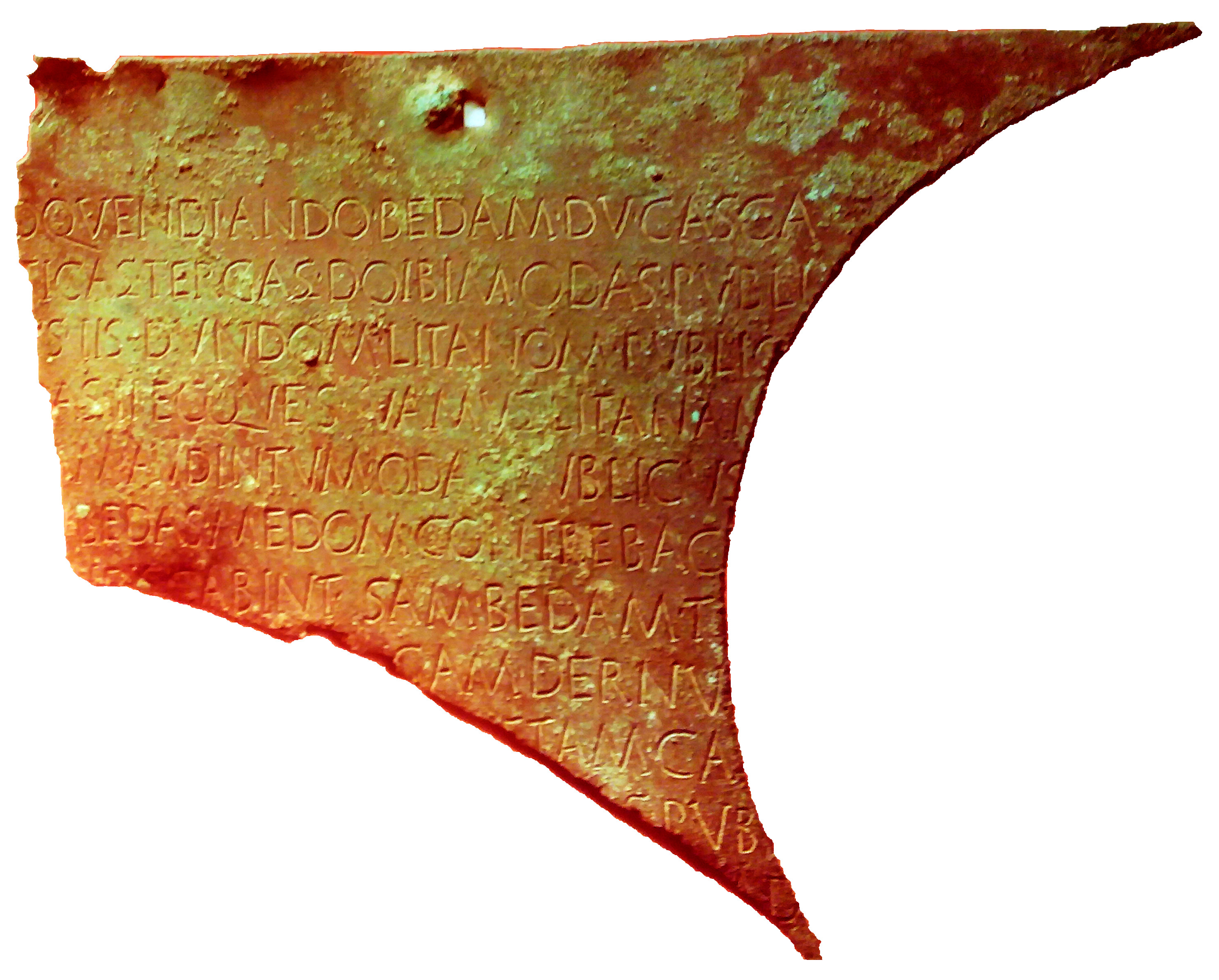 Imagen completa del bronce de Novallas.